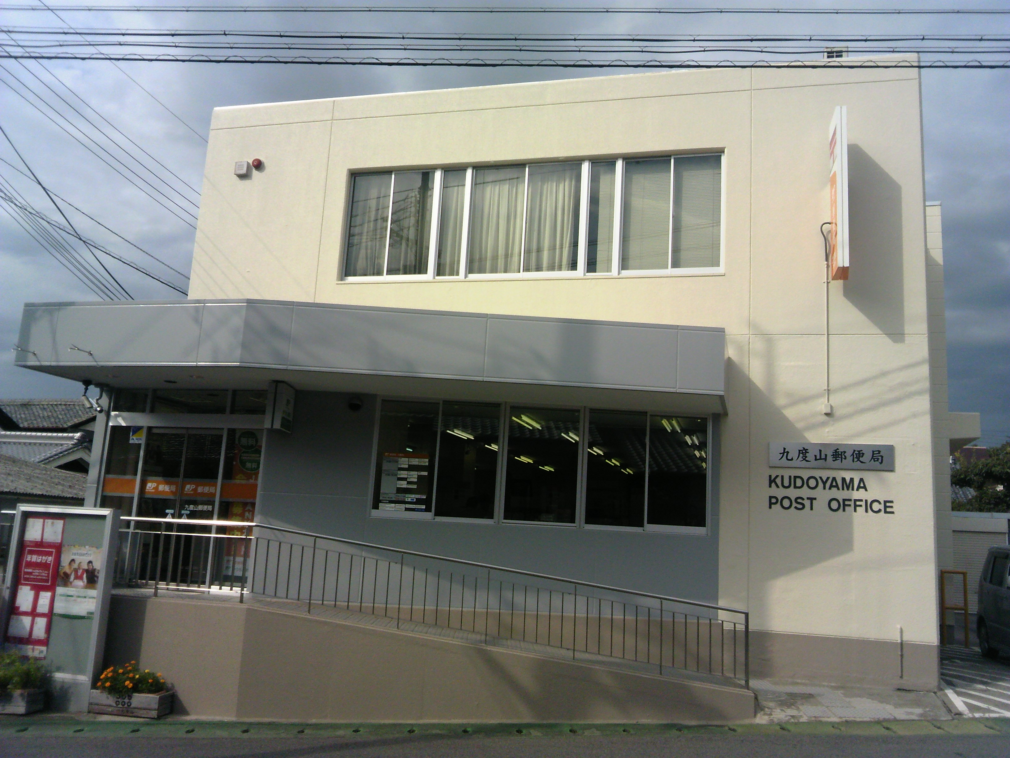 九度山郵便局